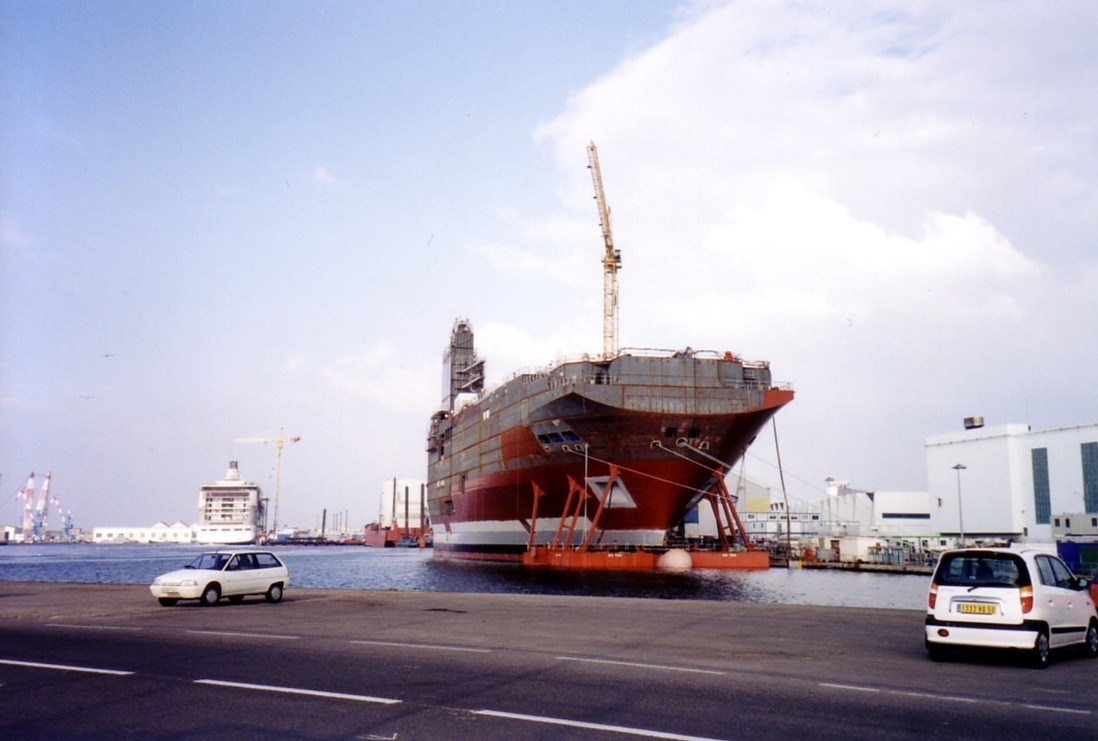 Shipbuilding at Chantiers de l'Atlantique in St. Nazaire